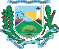 Escudo del municipio Mario Briceño Iragorri. Estado Aragua. Venezuela